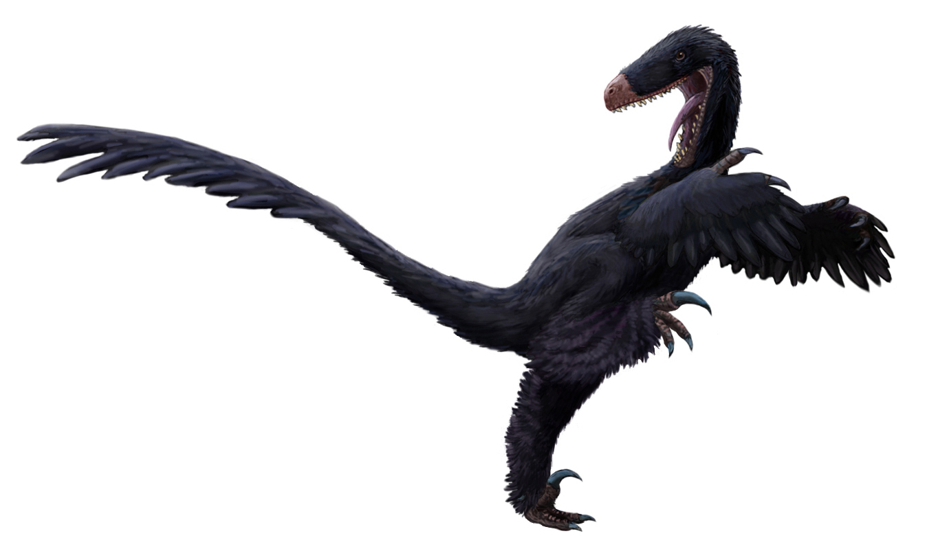 Luanchuanraptor.